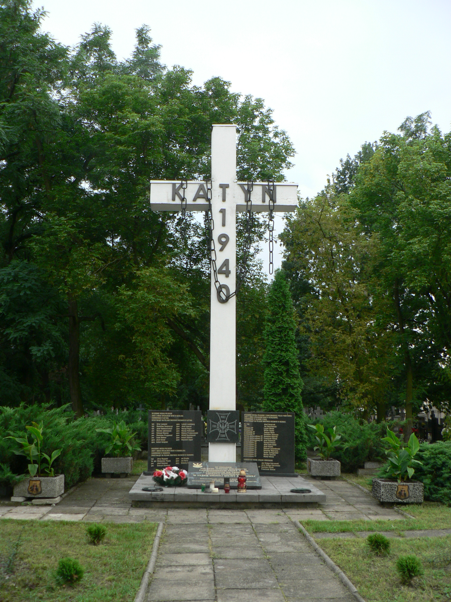 Tomaszów Mazowiecki - Pomnik ofiar Katynia